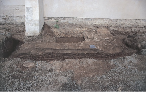 Ausgrabungen Kirche Nidderau-Eichen, Main-Kinzig-Kreis, Hessen, Deutschland